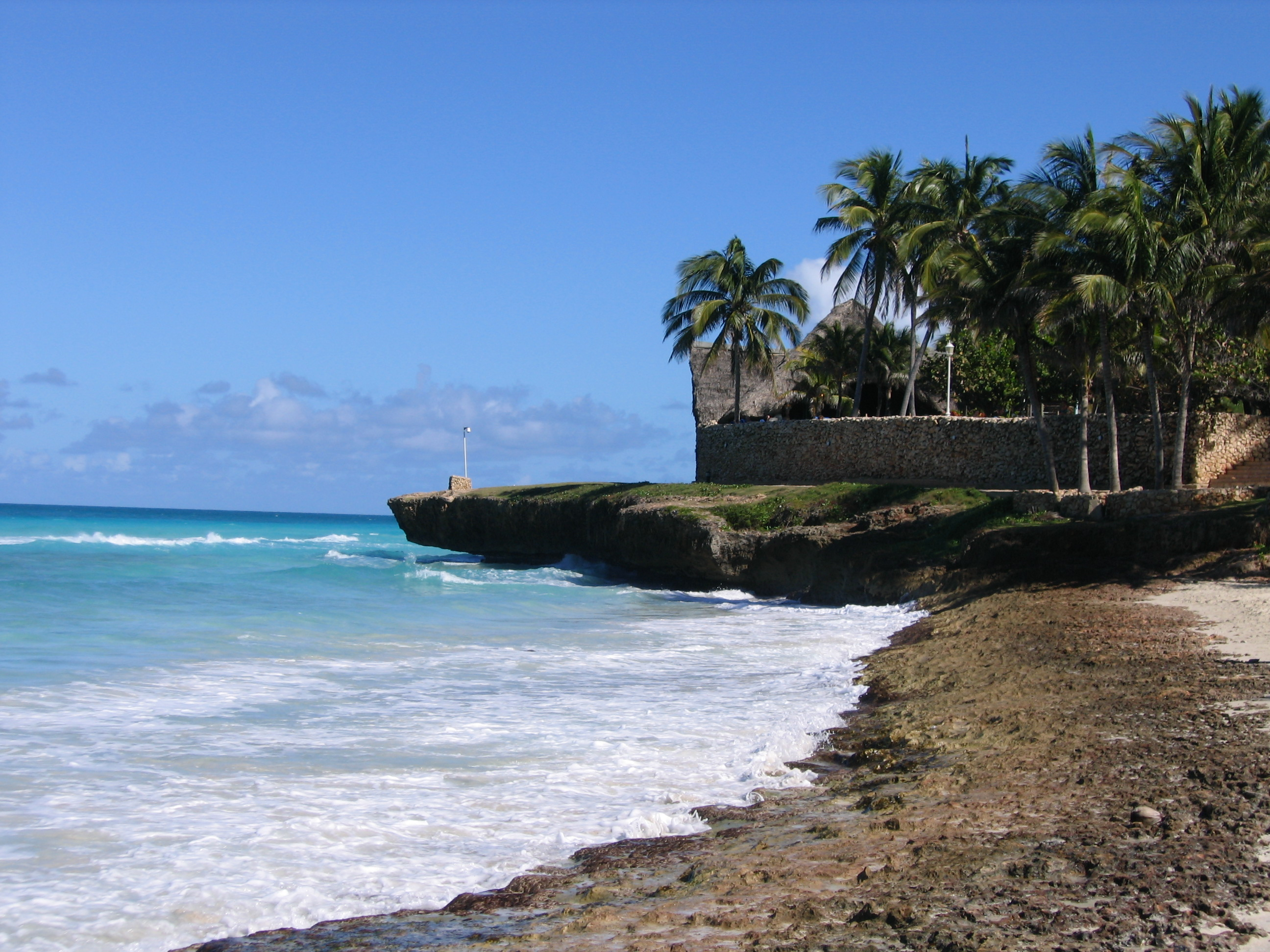 plage de Varadero, vagues.